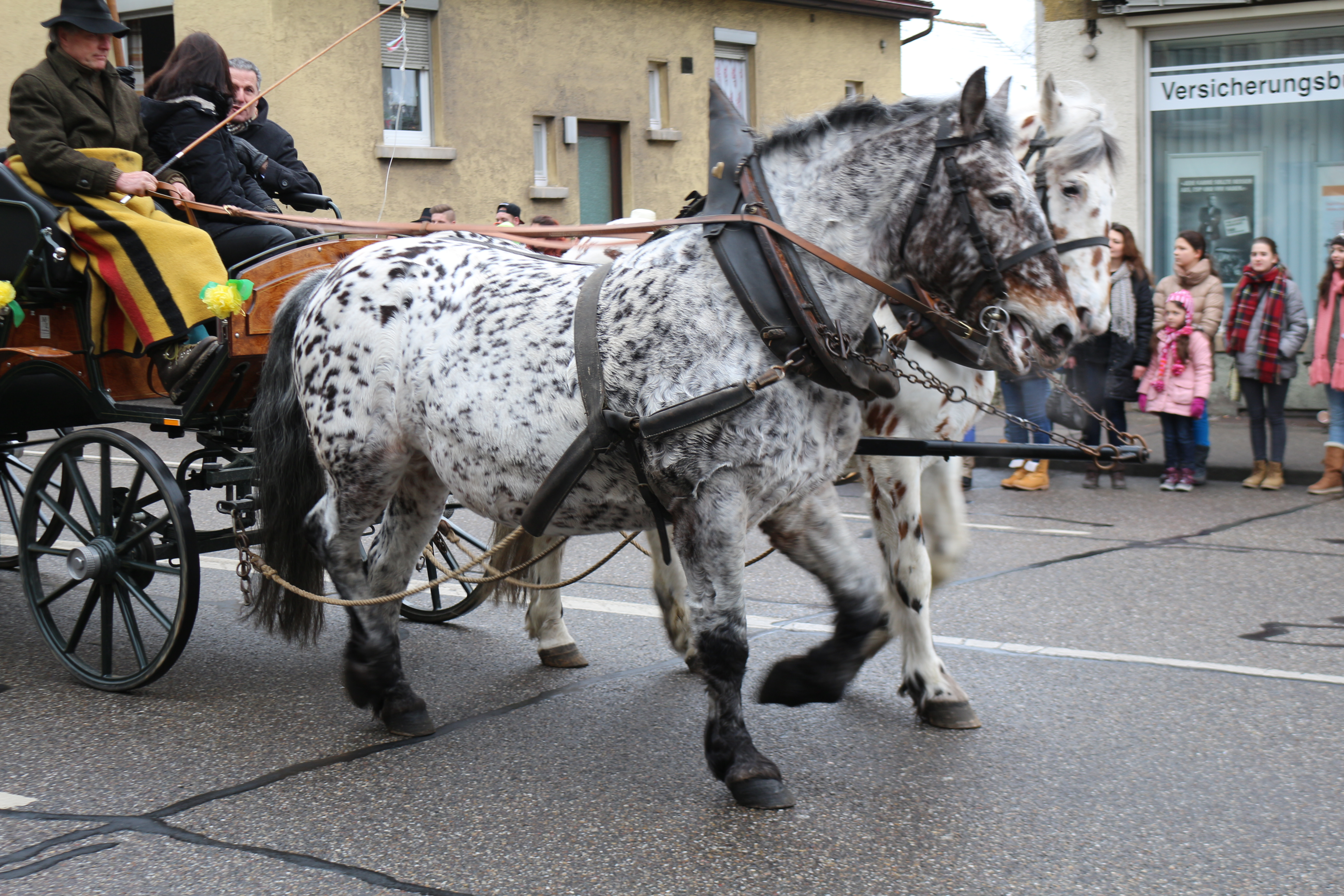 Umzug Pferdemarkt in Leonberg, 10. Februar 2015, Zweispänner